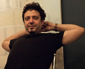 Raúl Cordero en la Habana, Cuba.